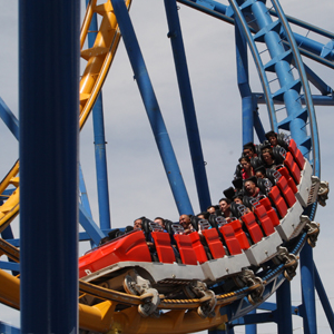 Esta es la Montaña Rusa Tsunami, ubicada en la "Isla de San Marcos" en Aguascalientes, México. Solo opera durante los festejos de la Feria Nacional de San Marcos.